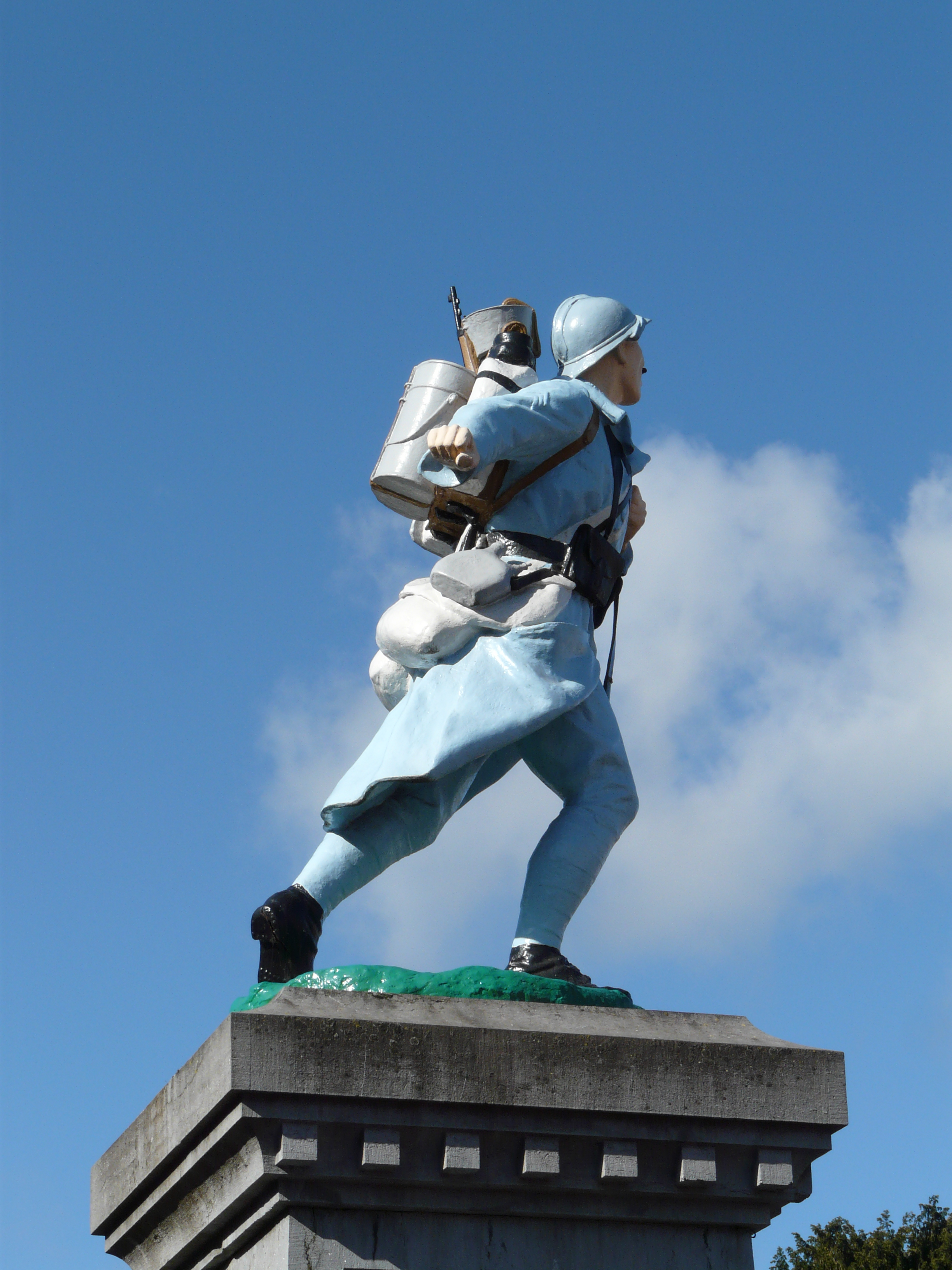 Le monument aux morts d'Iwuy (Nord)